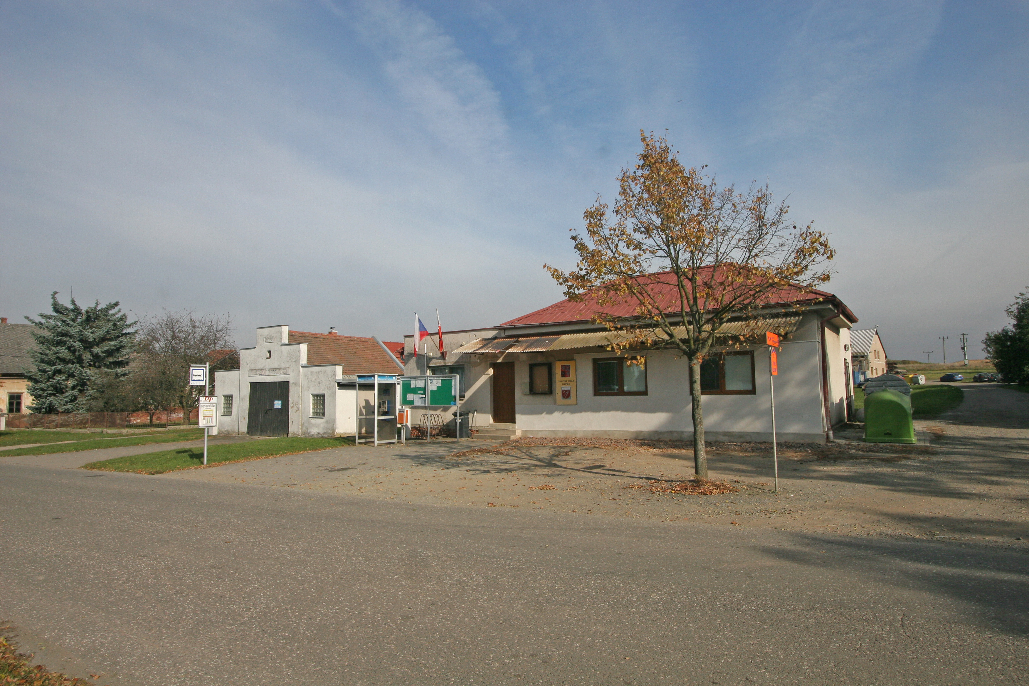 Divec obecní úřad